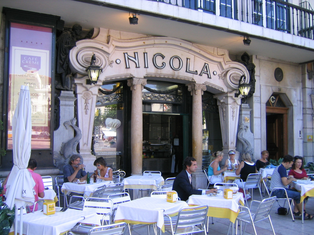 O histórico Café Nicola, localizado na cidade de Lisboa.